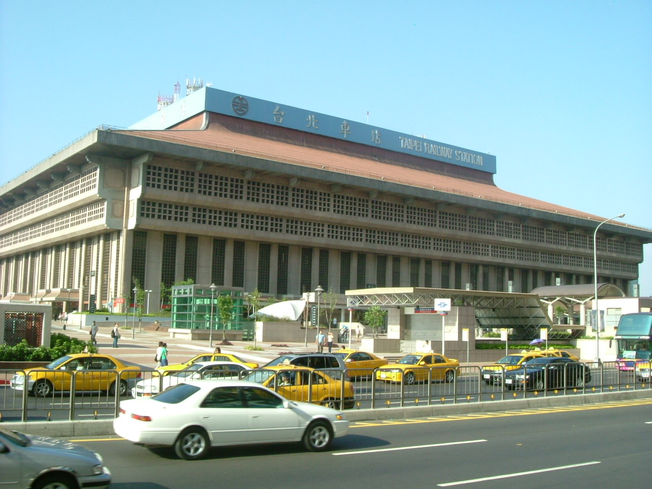 臺灣鐵路管理局臺北車站忠孝西路側。Bân-lâm-gú: Tâi-uân Thih-lōo-kio̍k Tâi-pak-tshia-tsām.